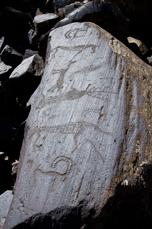 Ուղտասարի ժայռապատկերների լուսանկար